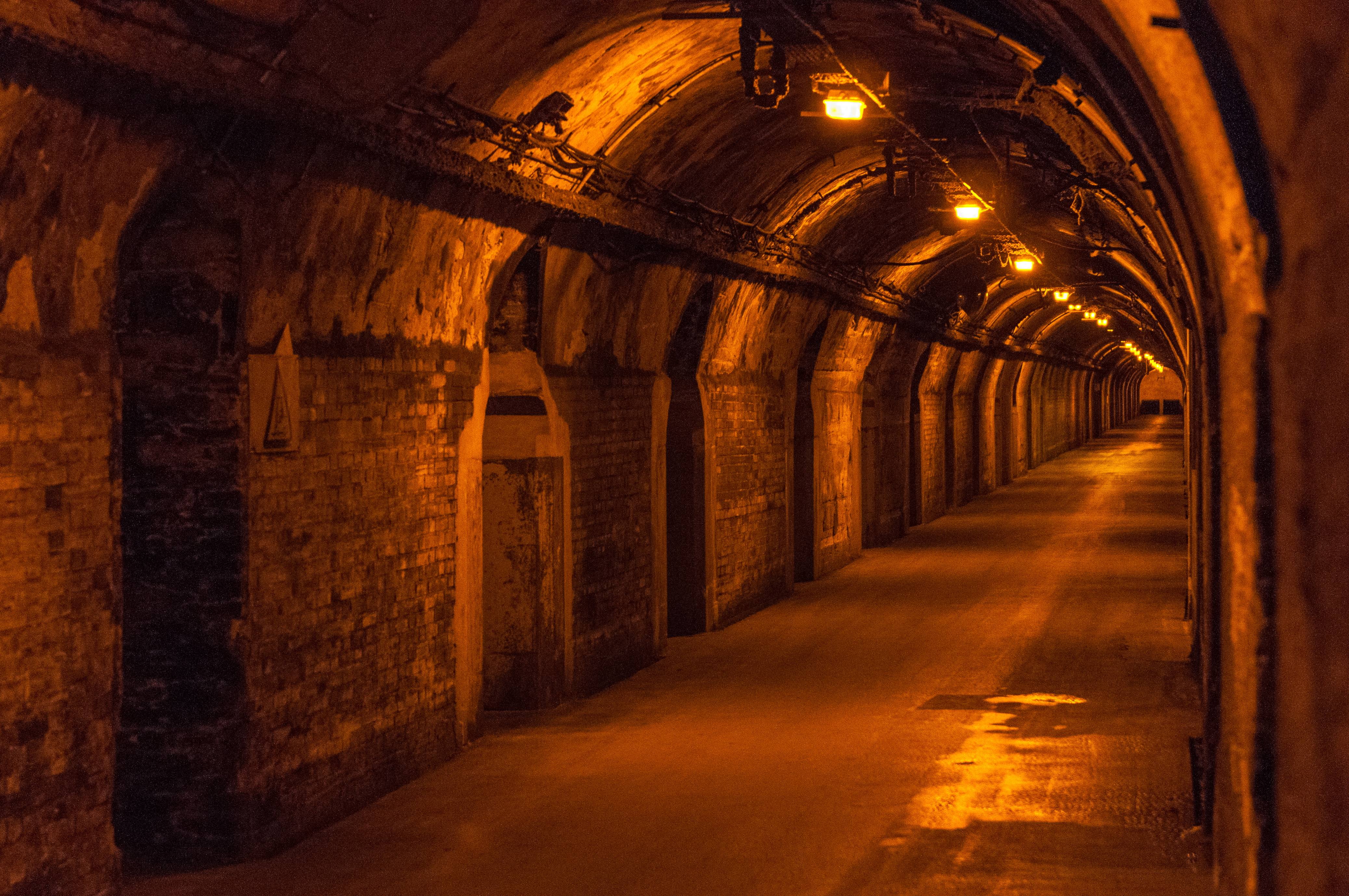 G. H. Mumm